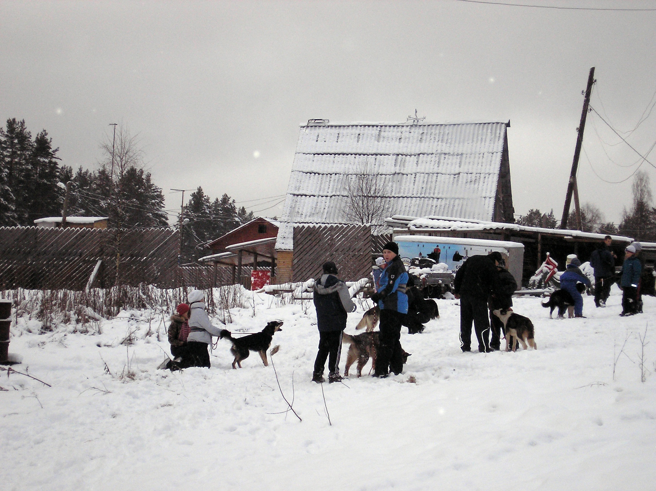 Прогулка детей с ездовыми собаками в рамках канистерапии